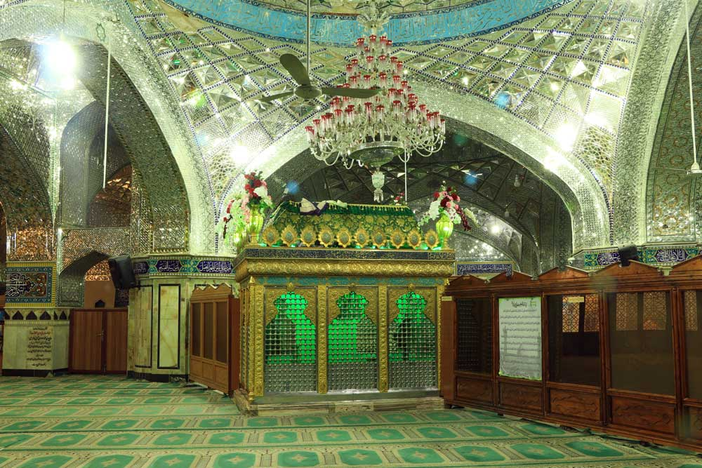 نمای داخلی ضریح حضرت یحیی بن زید علیه السلام